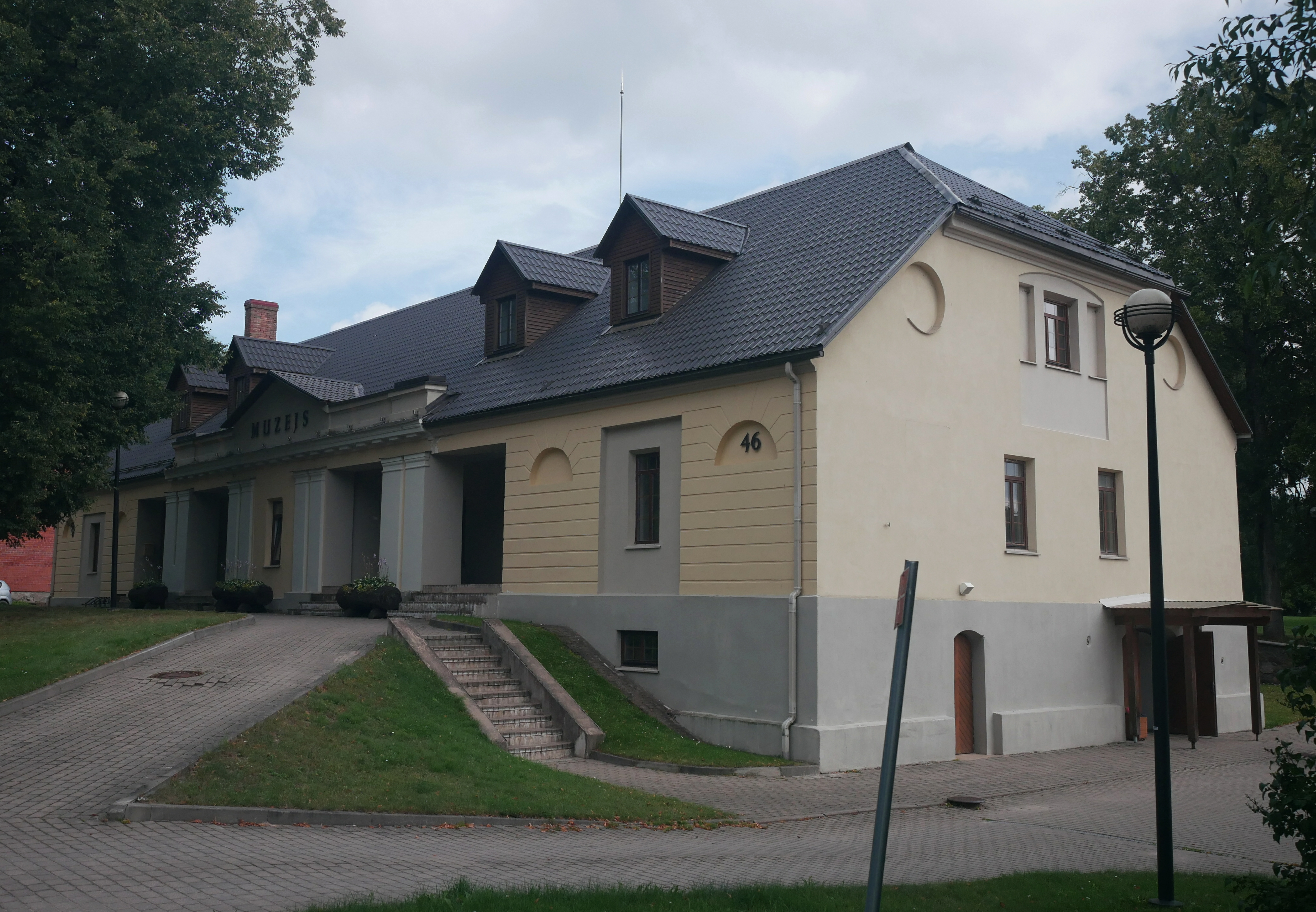 Balvi mõisa ait